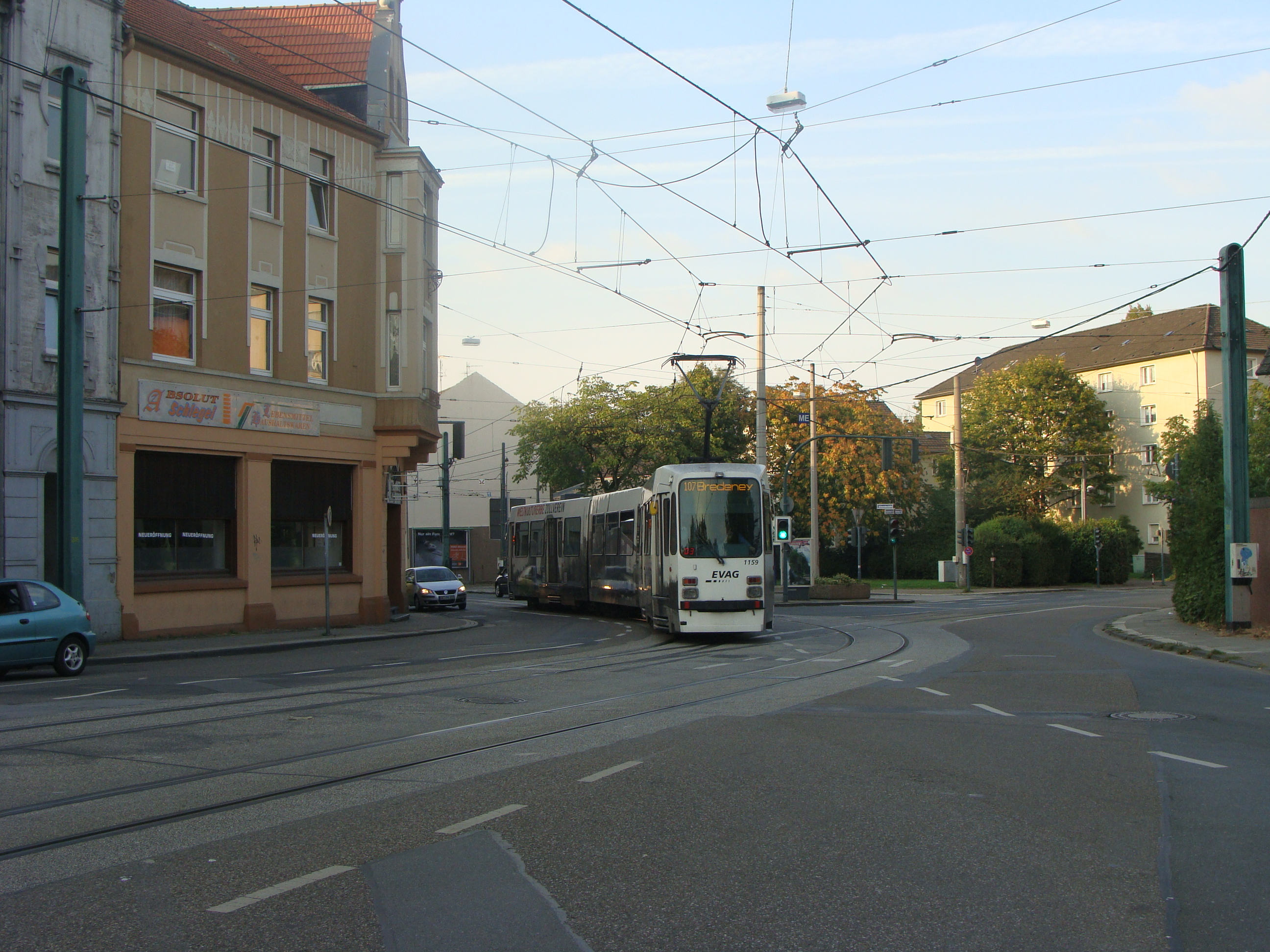 M Wagen auf der Kulturlinie 107